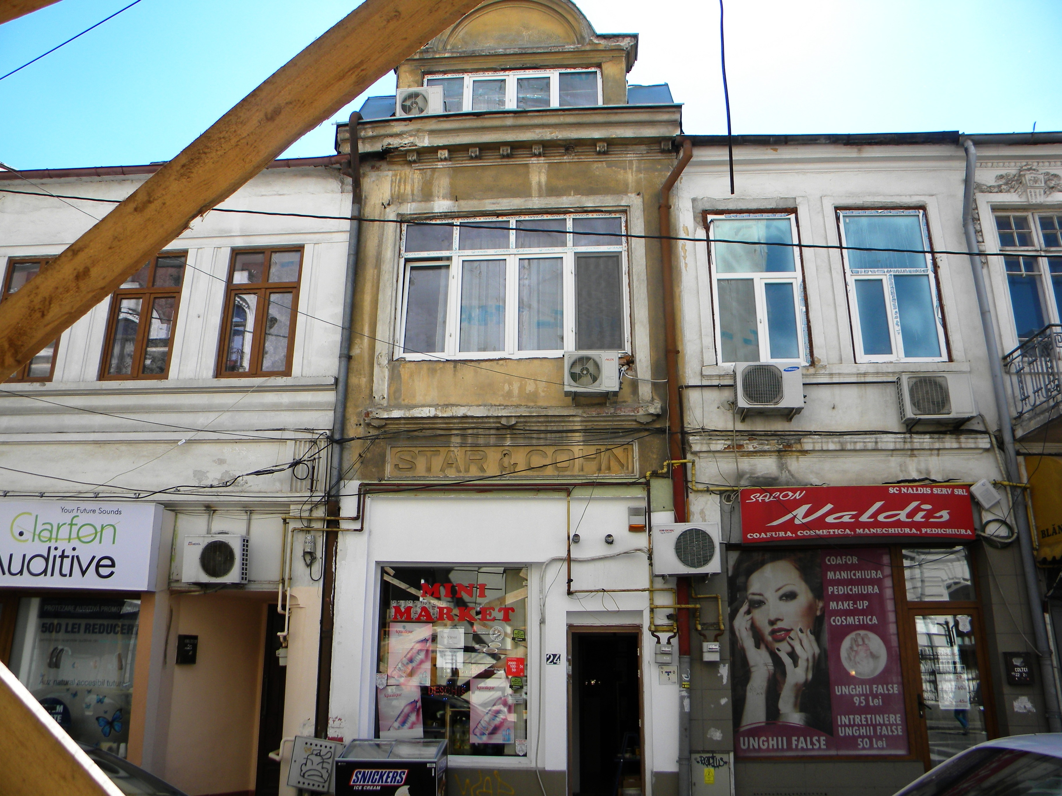 Bucuresti, Romania, Fostul magazin Star & Cohn pe Str. Coltei nr. 24, sect. 3